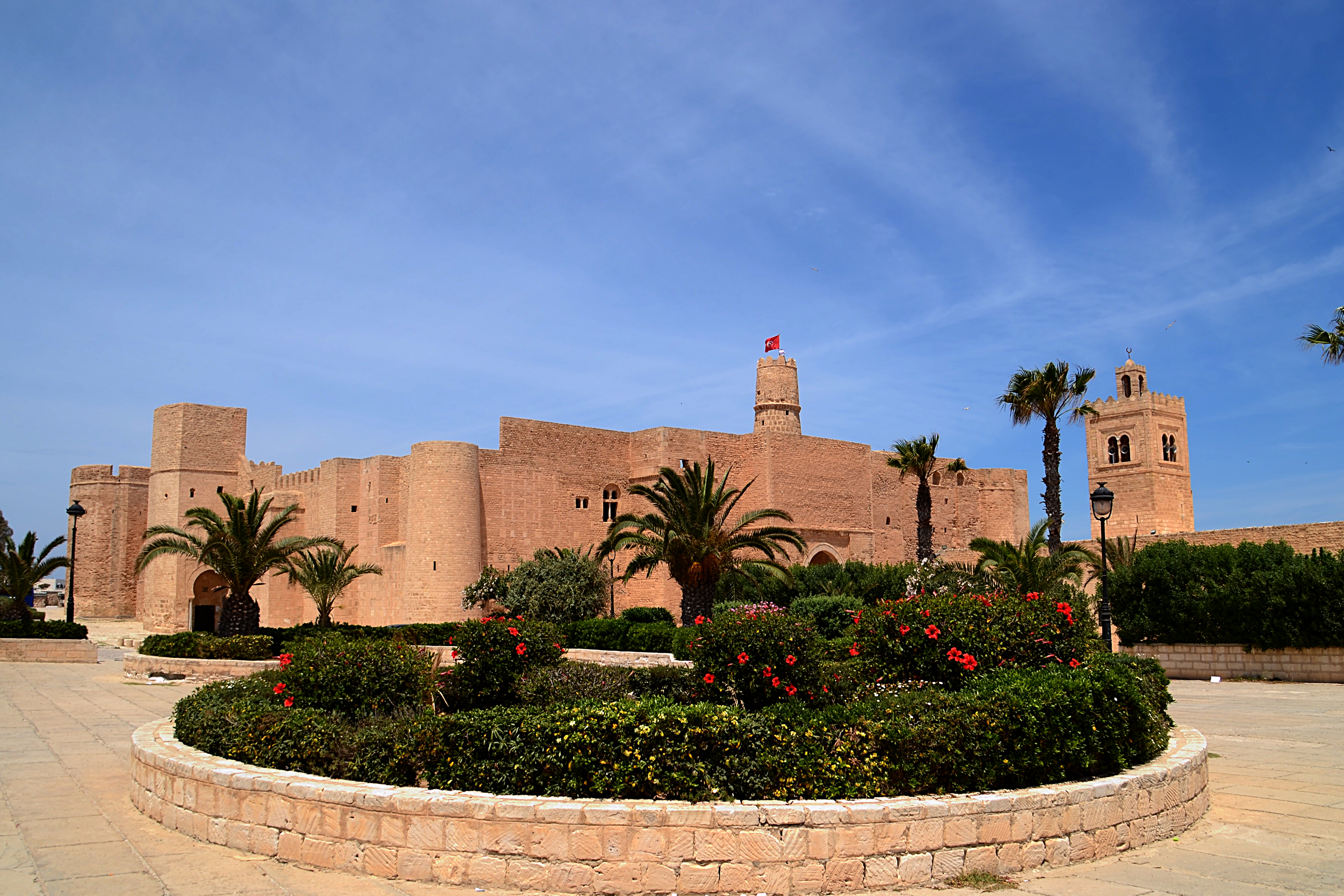 Kasba, Monastir